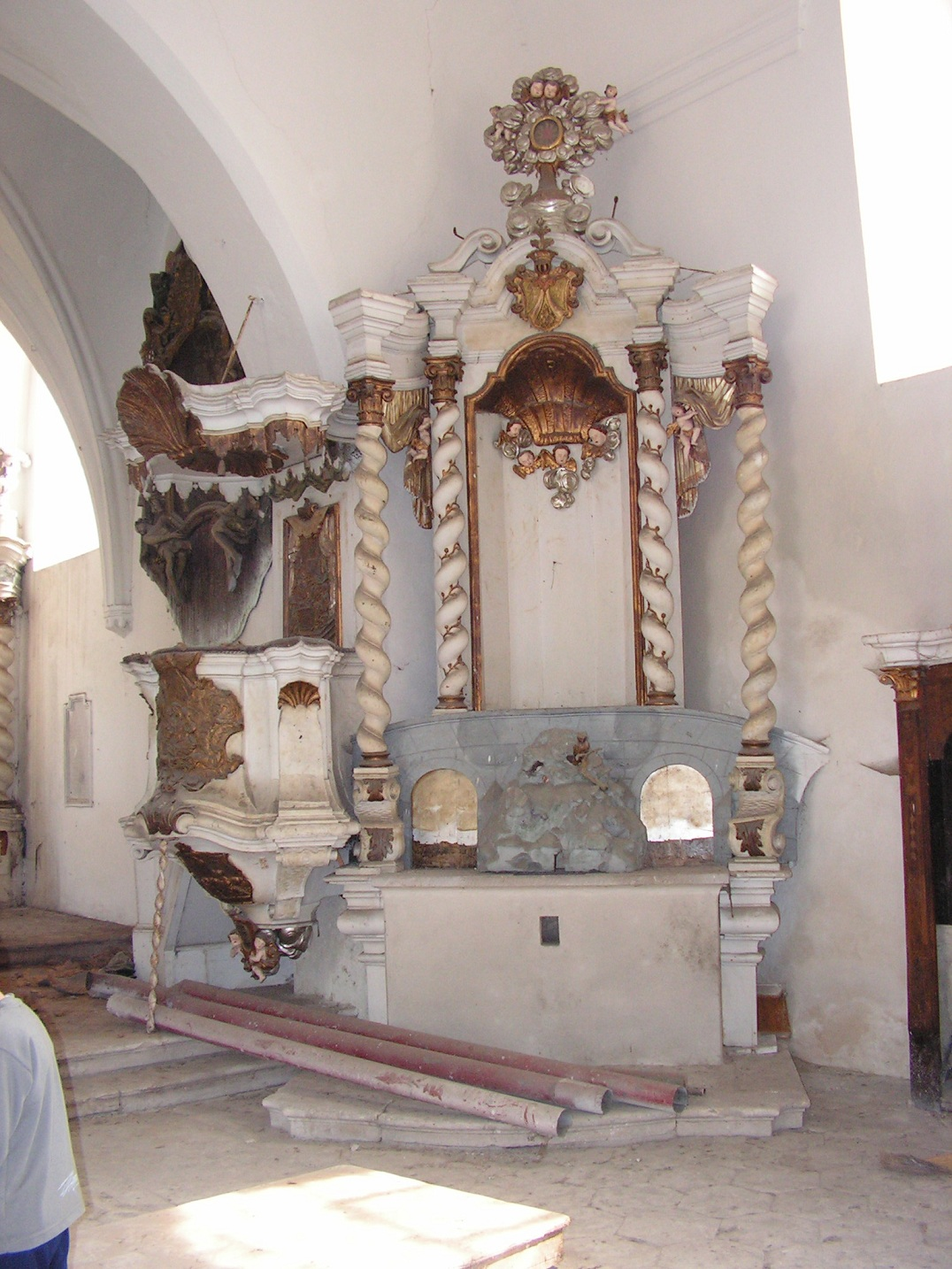 Kostel sv. Martina (Kozly), Kozly